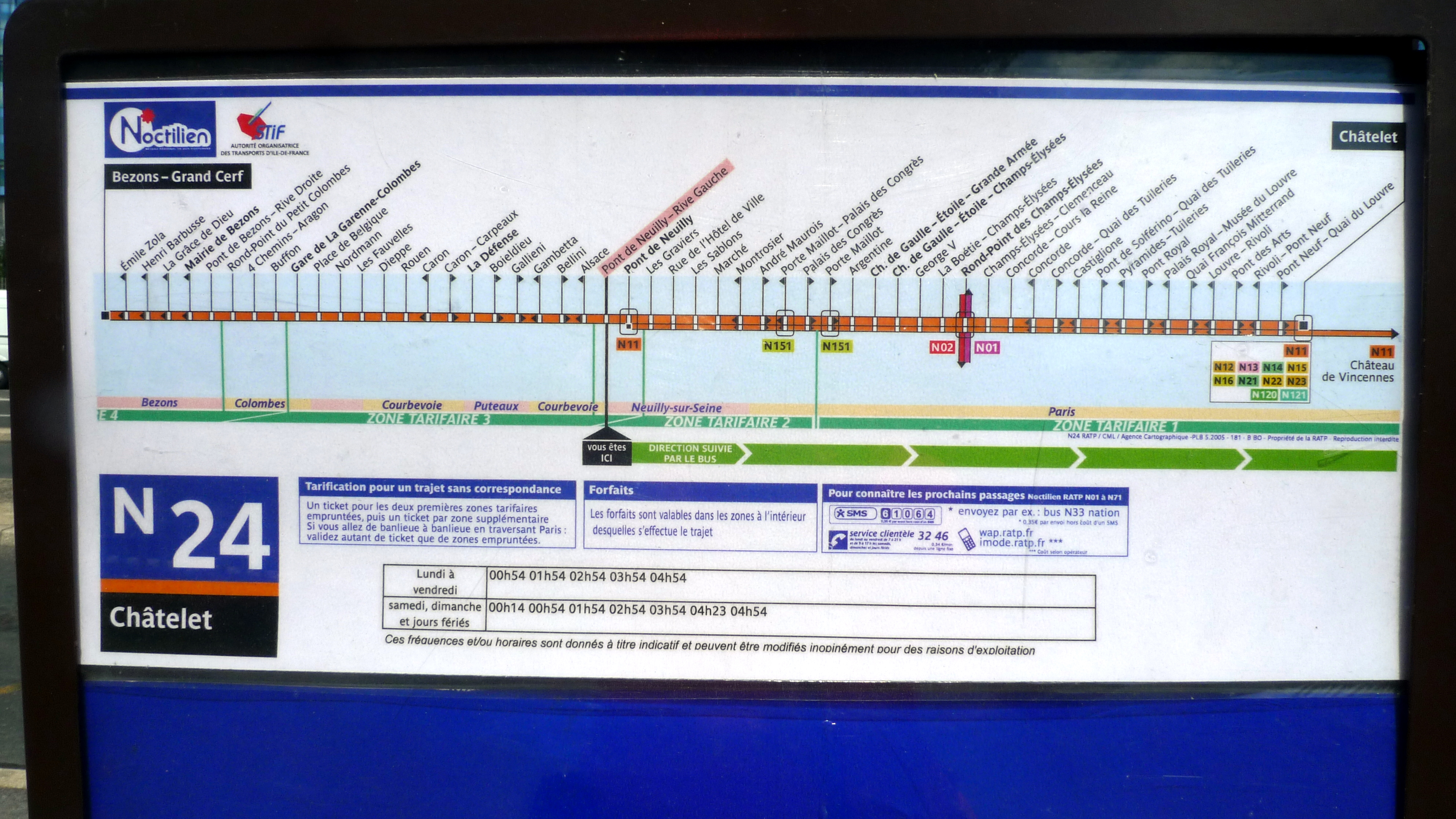 Bus ligne Noctilien N24